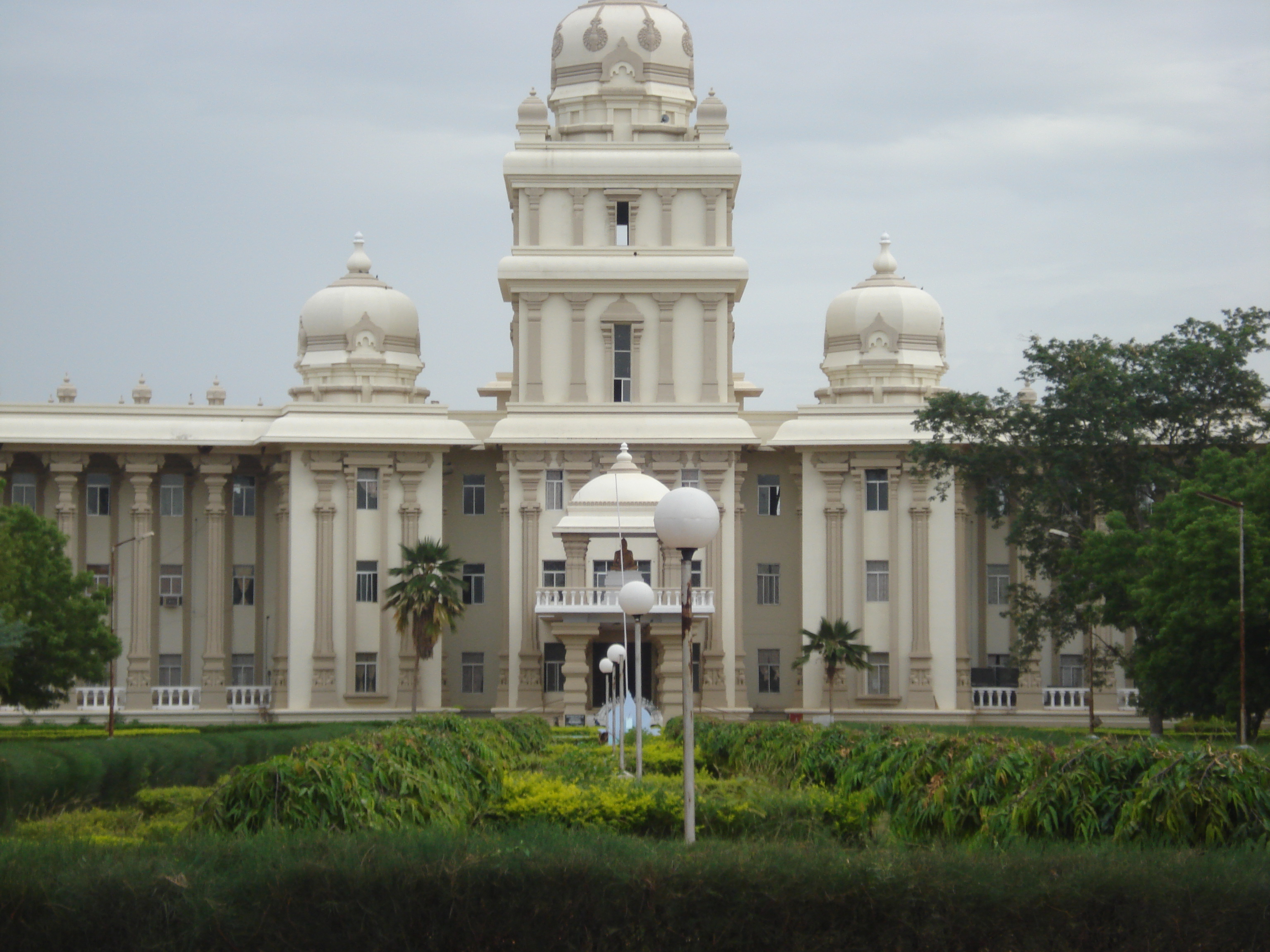 തമിഴ് സർവകലാശാല,തഞ്ചാവൂർ